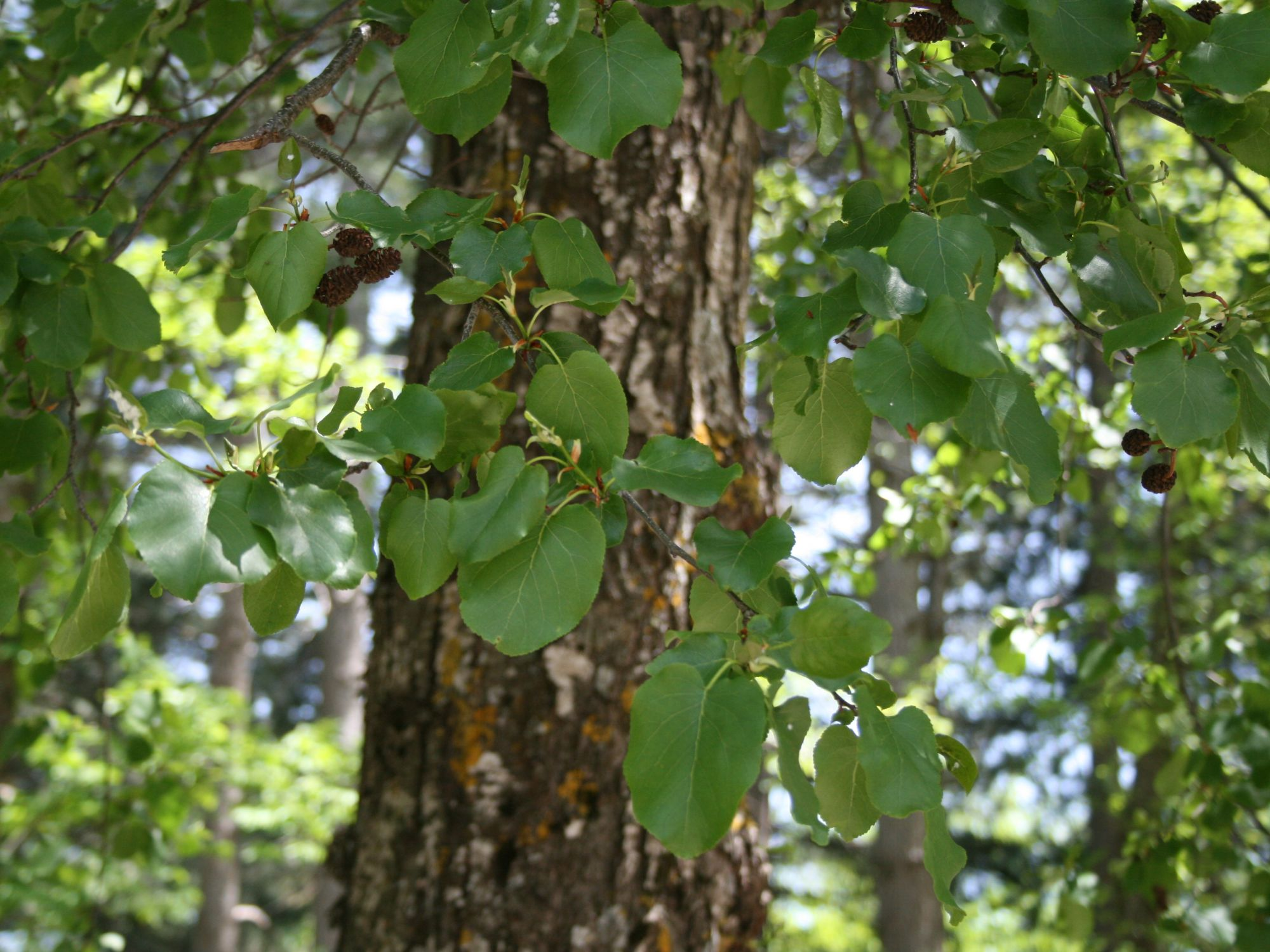 Alnus cordata, Birkengewächse (Betulaceae) - Italien/Italia/Italy: Kalabrien/Calabria, Prov. Reggio Calabria, Aspromonte, S Sant'Eufemia d'Aspromonte